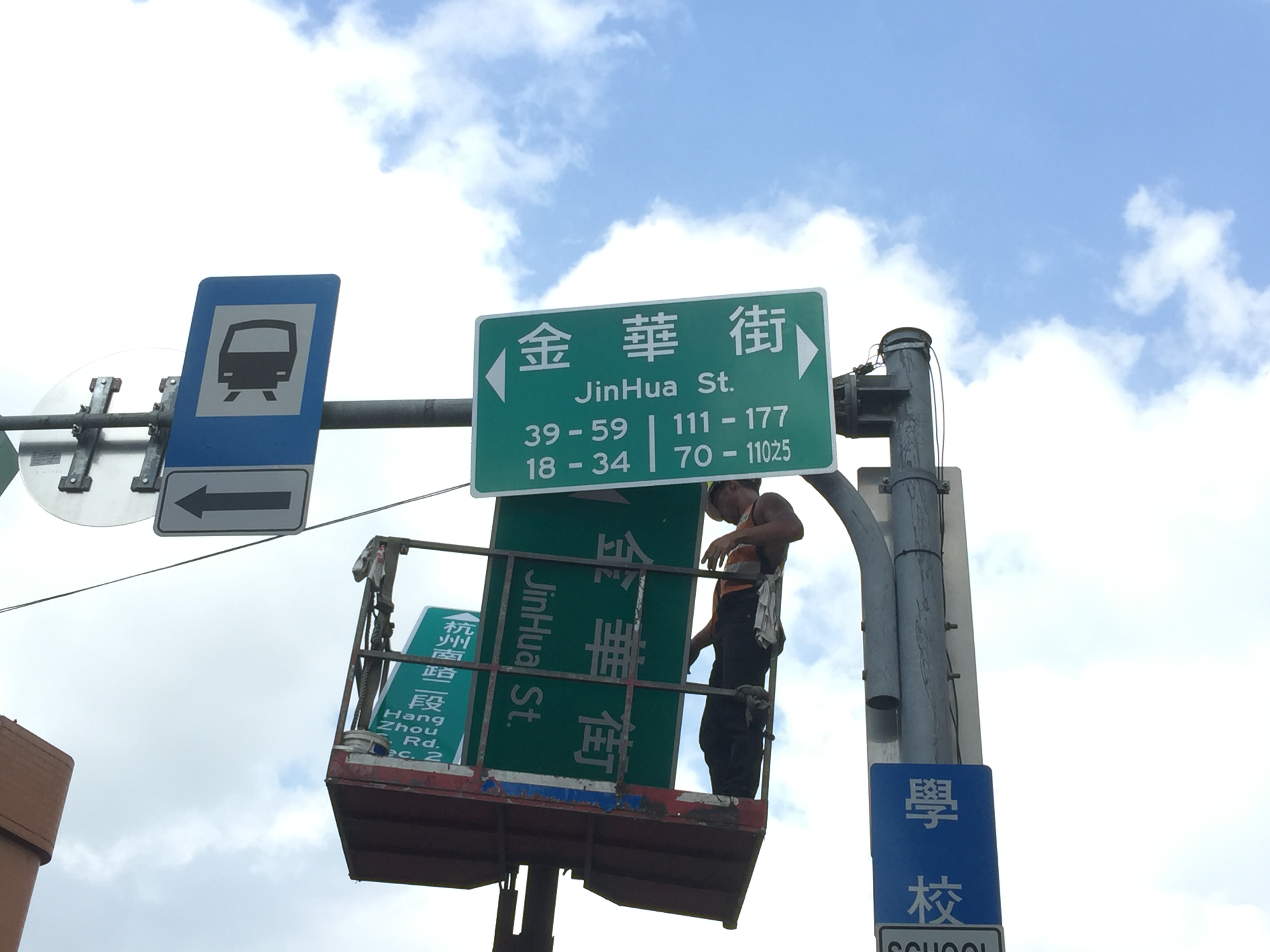 臺北市金華街路牌更換為加註鄰近門牌號碼的版本。